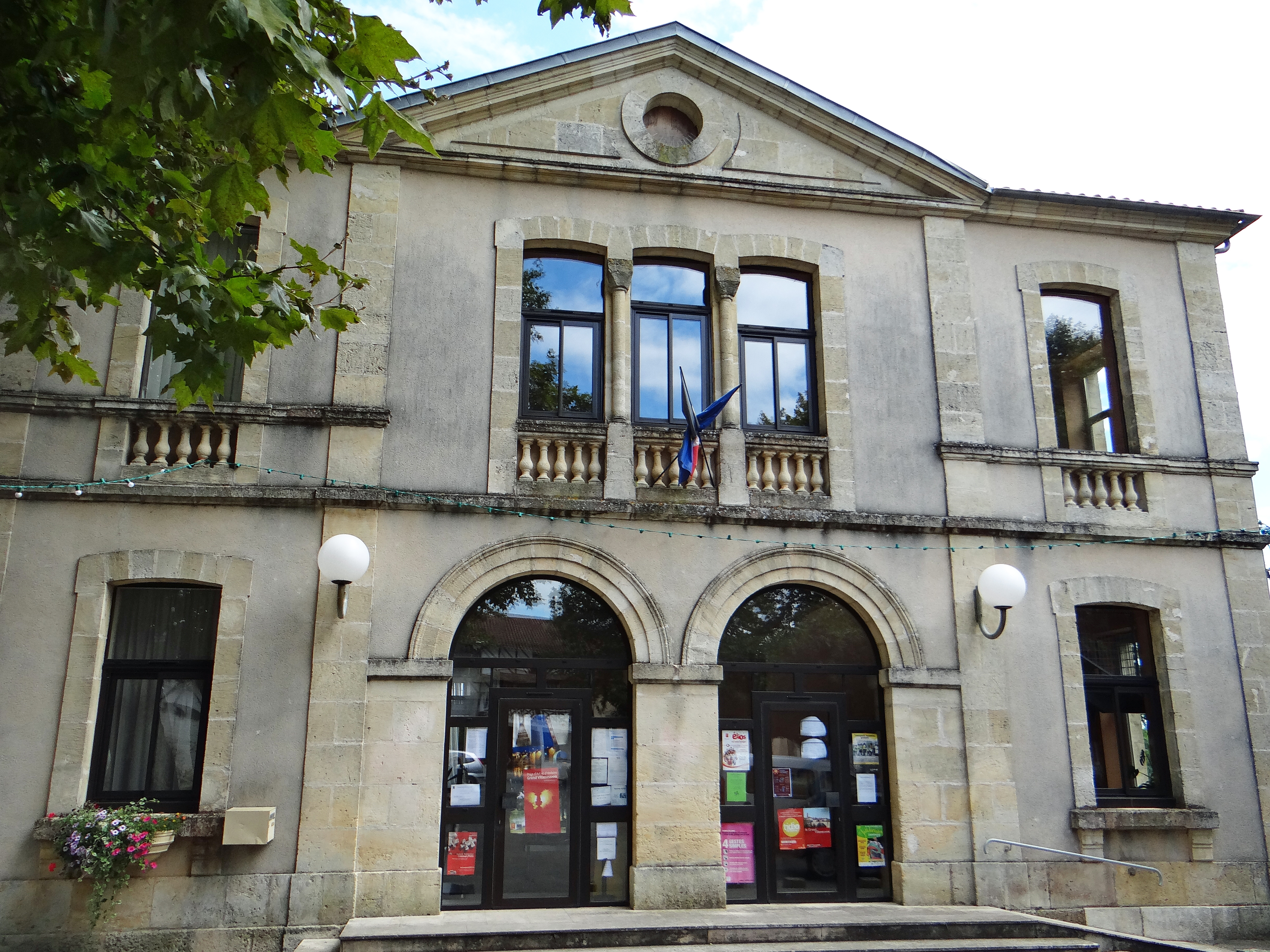 Fongrave - Mairie